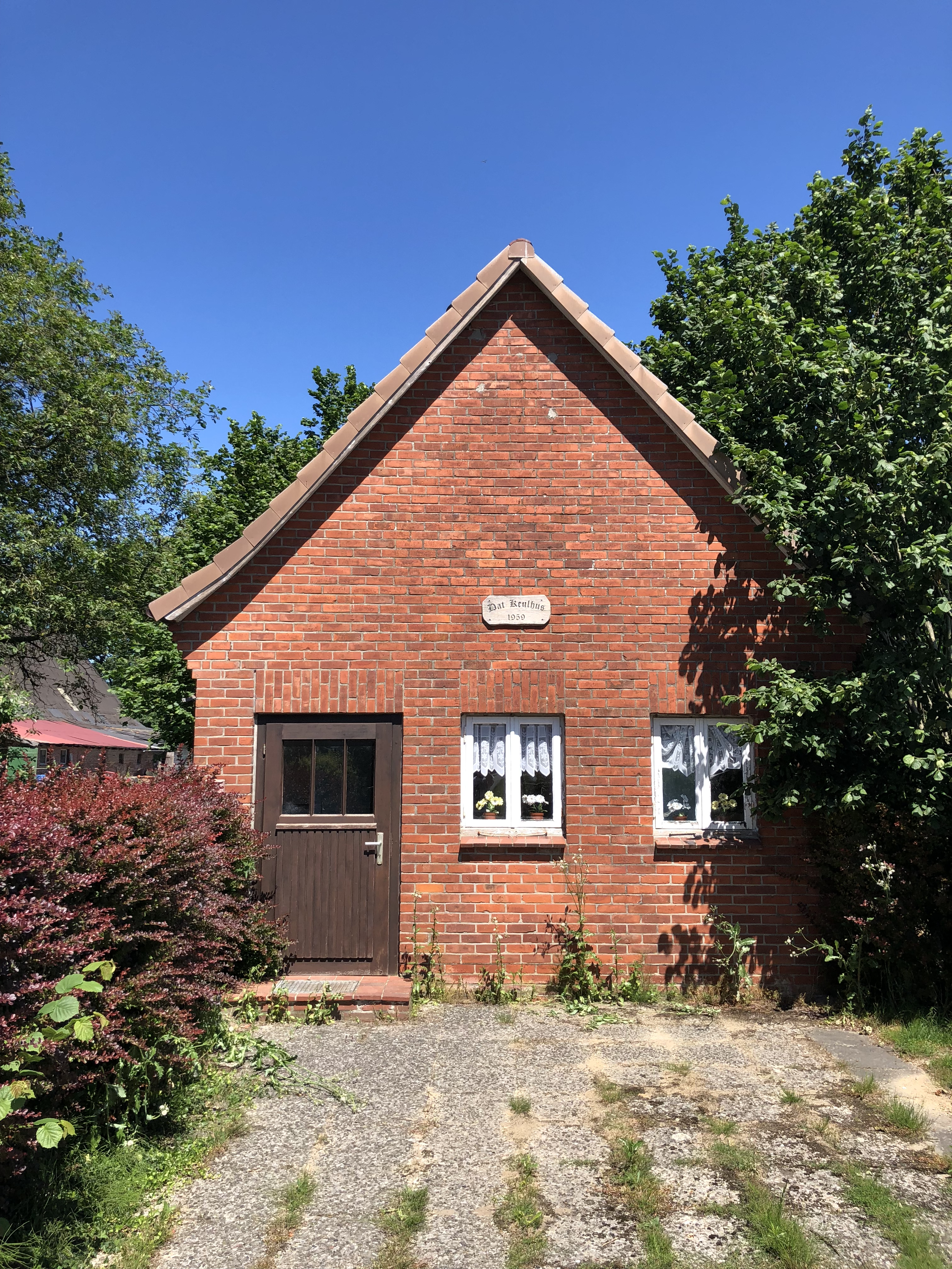 Köhlhuus in Wiegersen